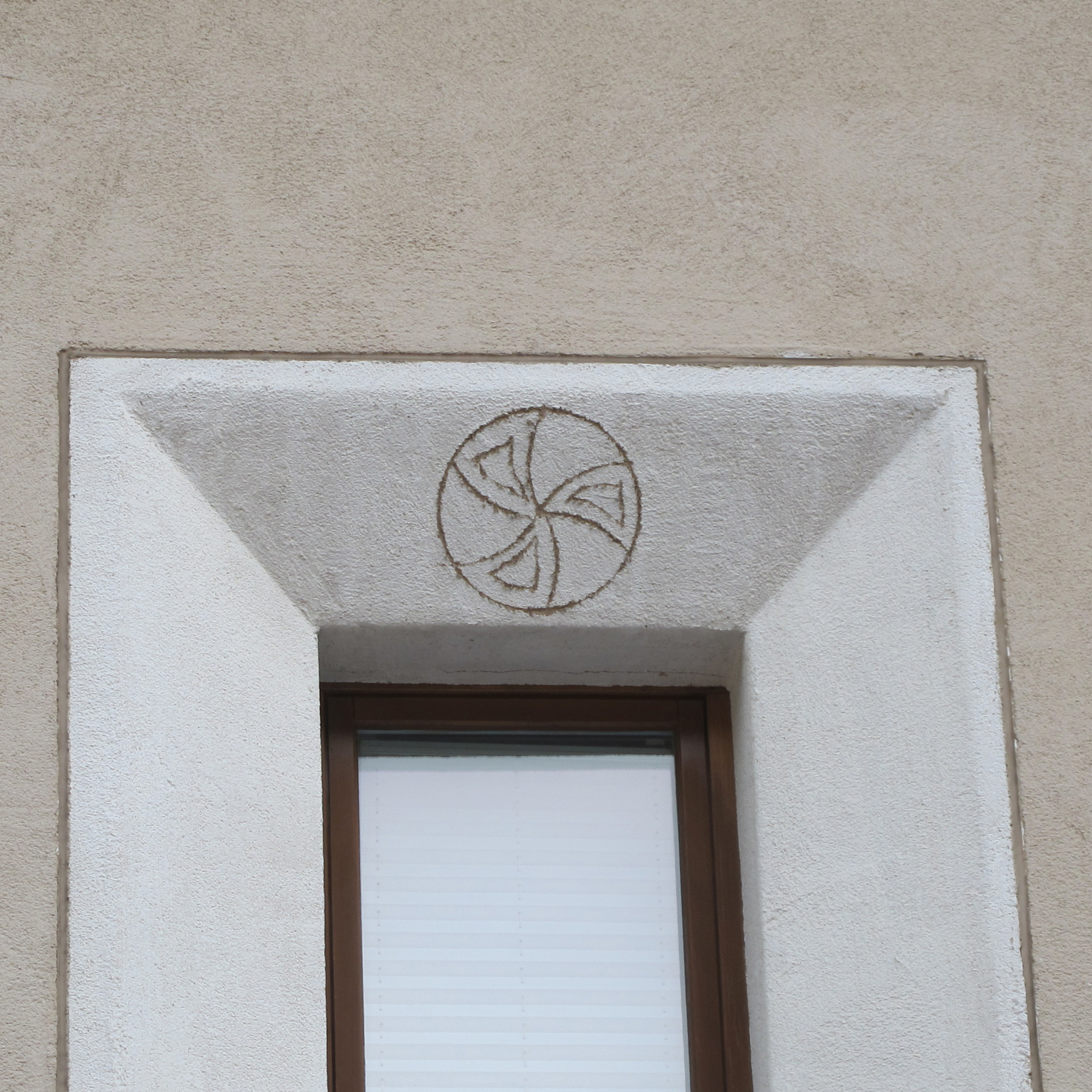 Triskel auf einem Haus in Sils, Engadin